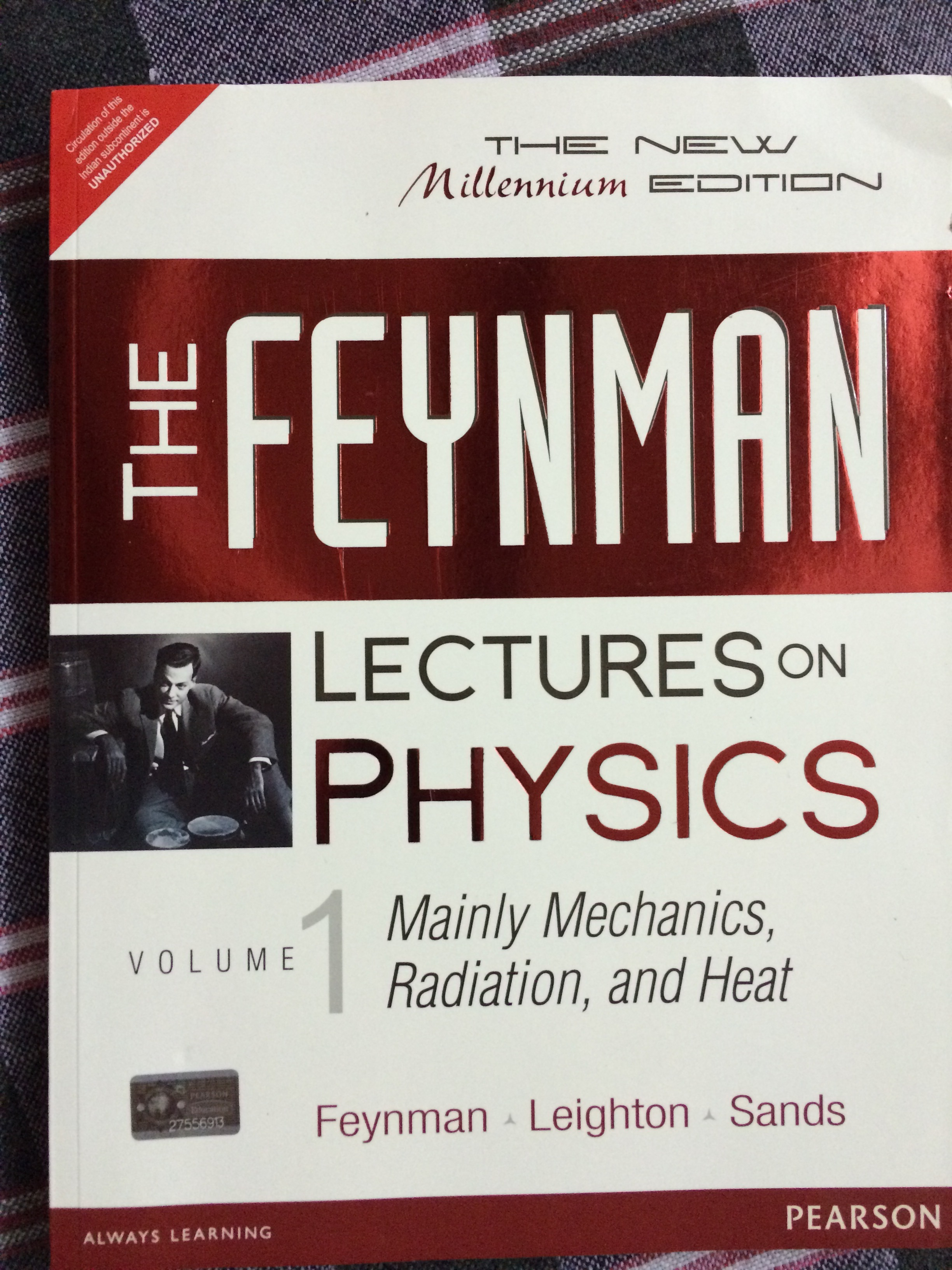 ਪੰਜਾਬੀ: ਵੋਲੀਊਮ 1